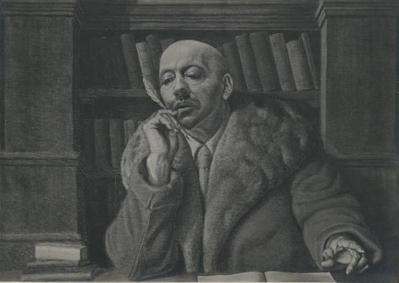 Astolfo de Maria Gabriele D'Annunzio 1930 Fotografie des Porträts